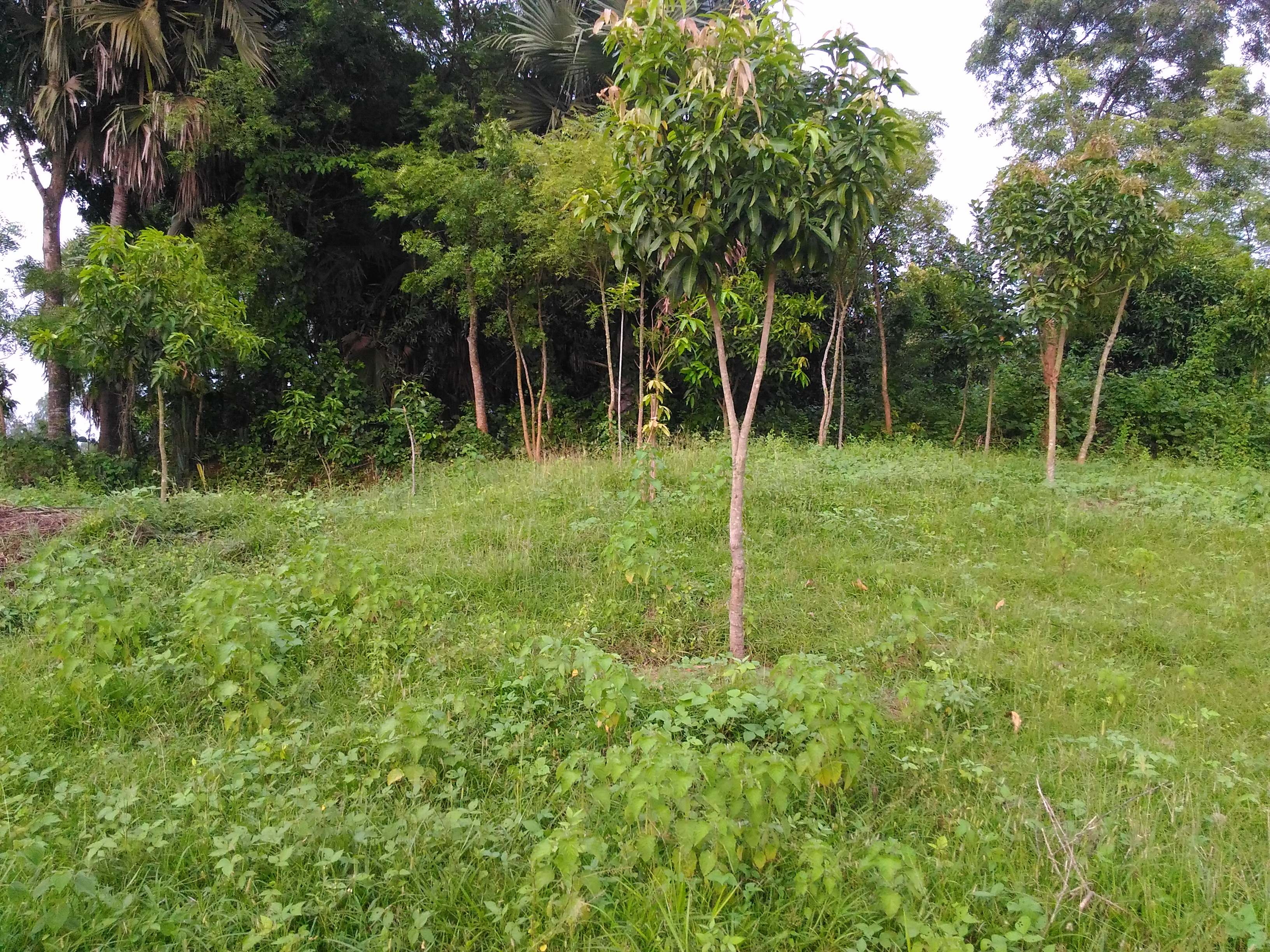 ধানোরা মাউন্ড